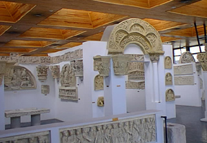 Le musée "Empereur Antonin" ou musée des moulages de l'Université Paul Valéry Photographie personnelle